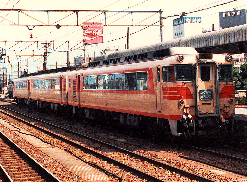 名古屋鉄道 キハ8000系特急 北アルプス 立山行